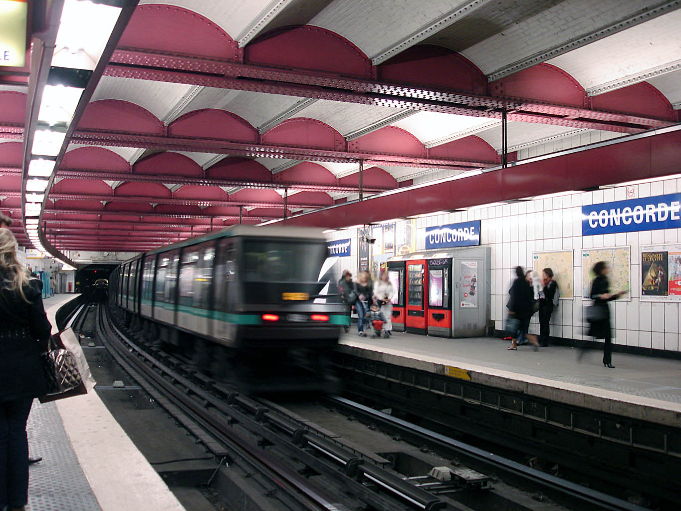 Station Concorde de la ligne 1 du métro de Paris, France.